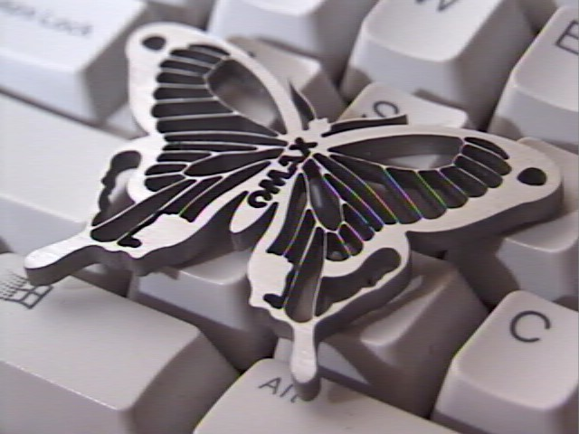 Gesneden uit 3mm RVS